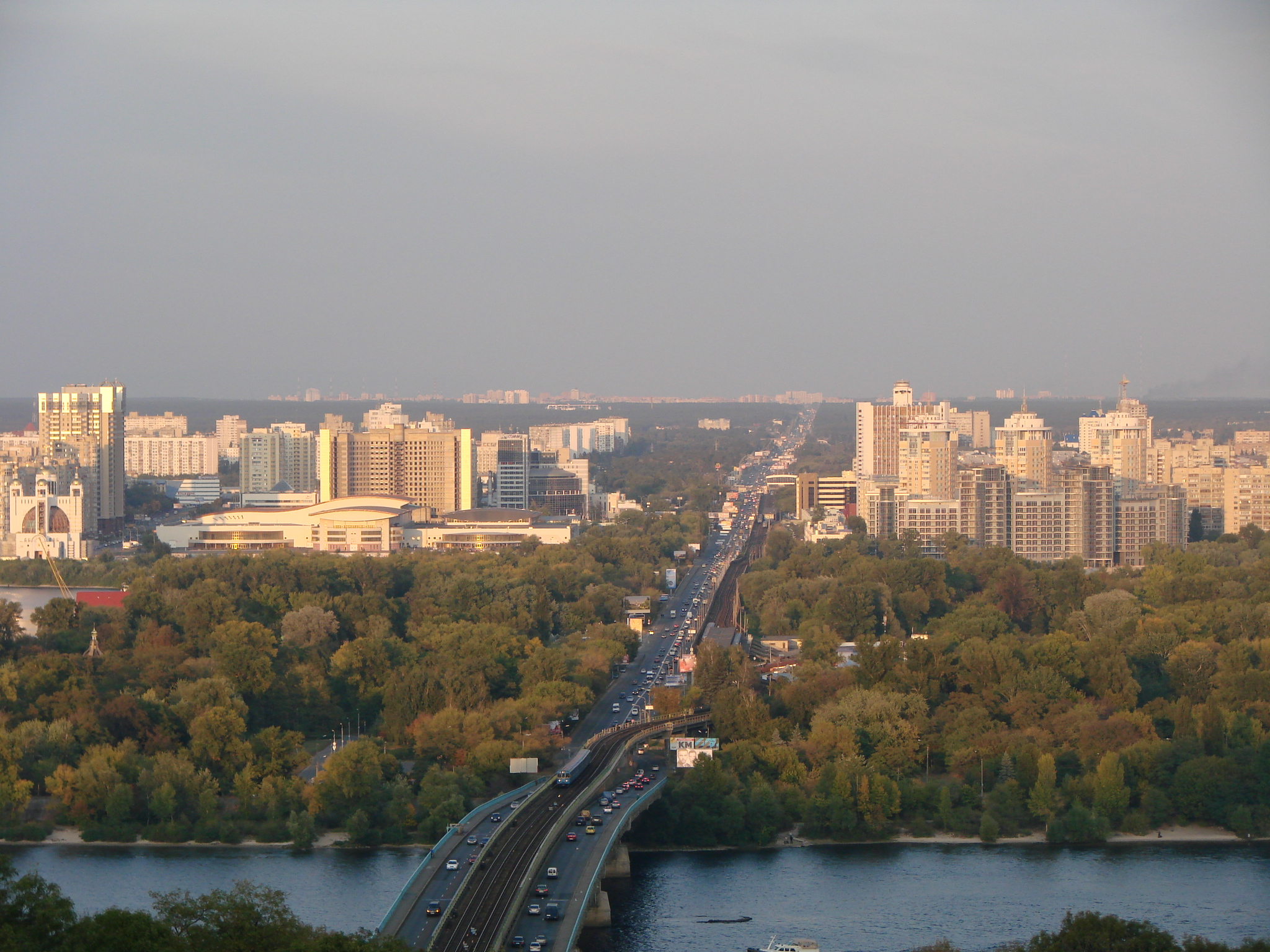 Перспектива Броварського проспекту зі схилів Дніпра